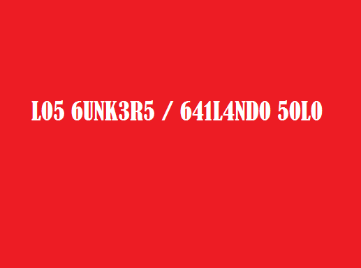 Caratula del single Bailando Solo